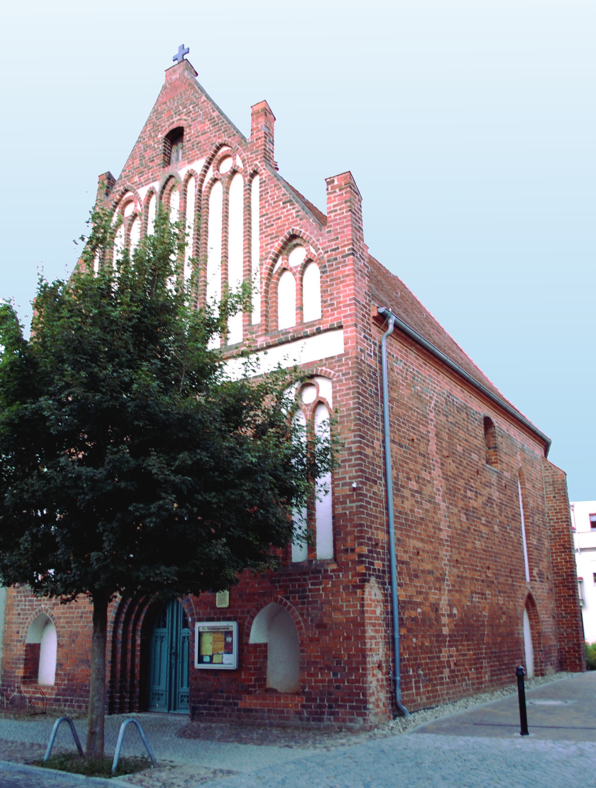 Georgenhospital in Templin